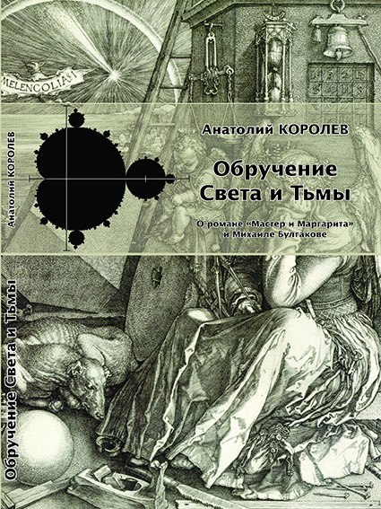 Обложка книги Анатолия Васильевича Королёва "Обручение света и тьмы. О романе "Мастер и Маргарита" и Михаиле Булгакове" (2013), оформленная самим автором.